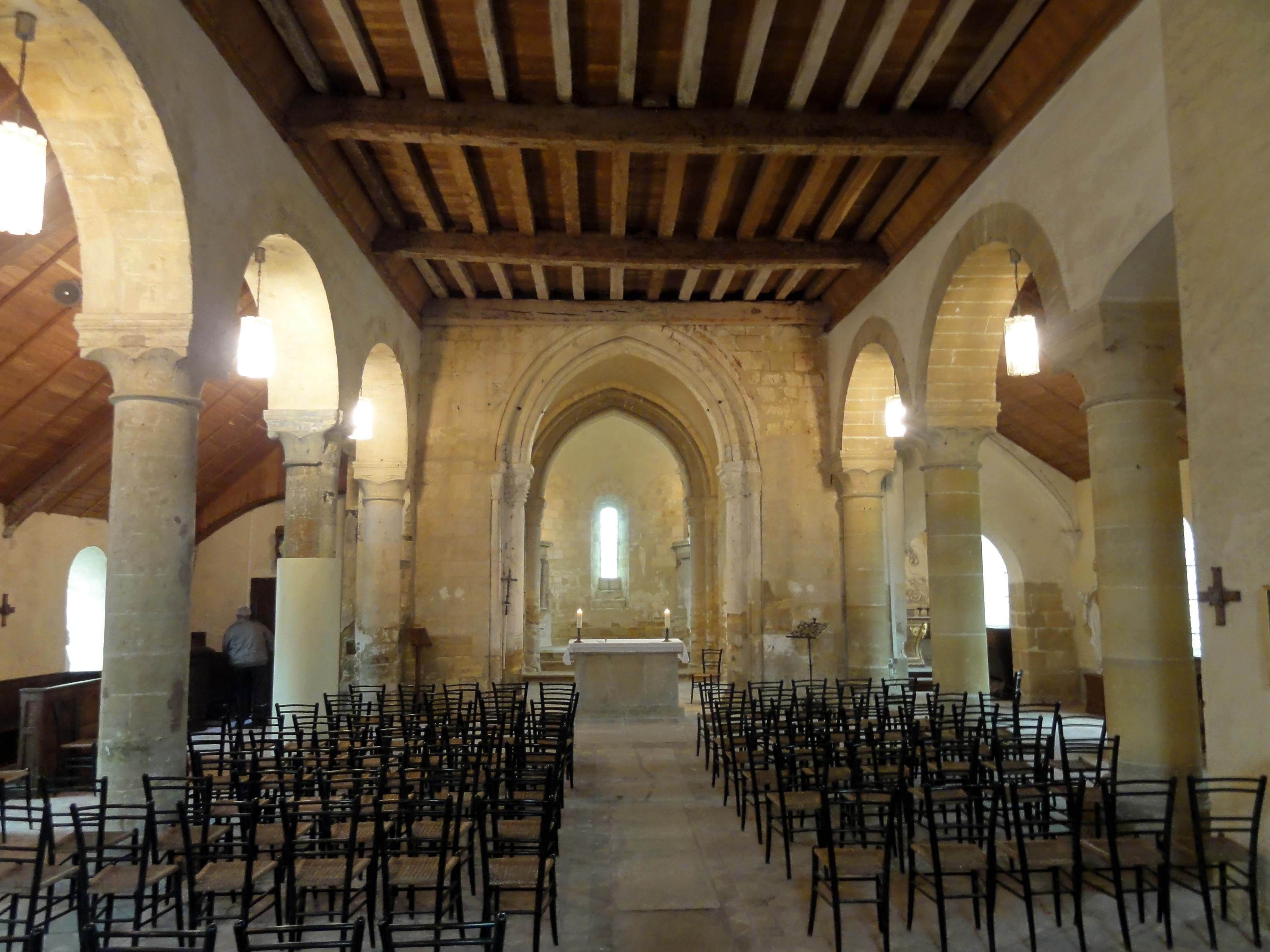 Intérieur de l'église - voir titre.